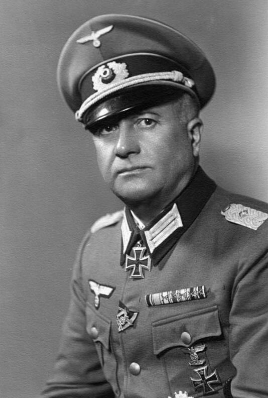 Oberstltn.[Oberstleutnant] Maximilian Wengler, Kdeur. Gren. Rgt. 366, geb. am 14.1.90 Ritterkreuz verliehen 6.10.42